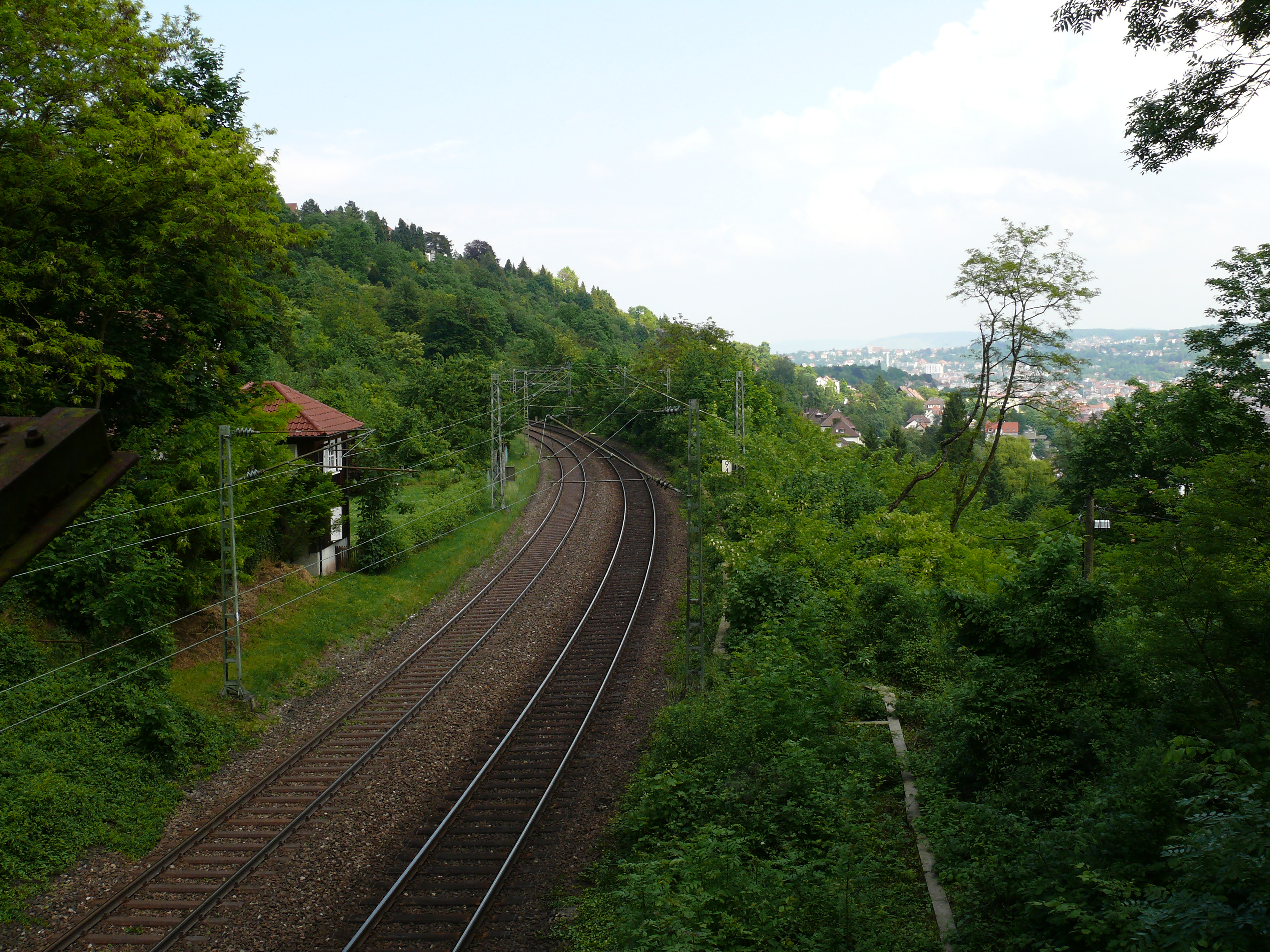 Die Gäubahn im Bereich des ehemaligen Haltepunkts Heslach in Stuttgart.